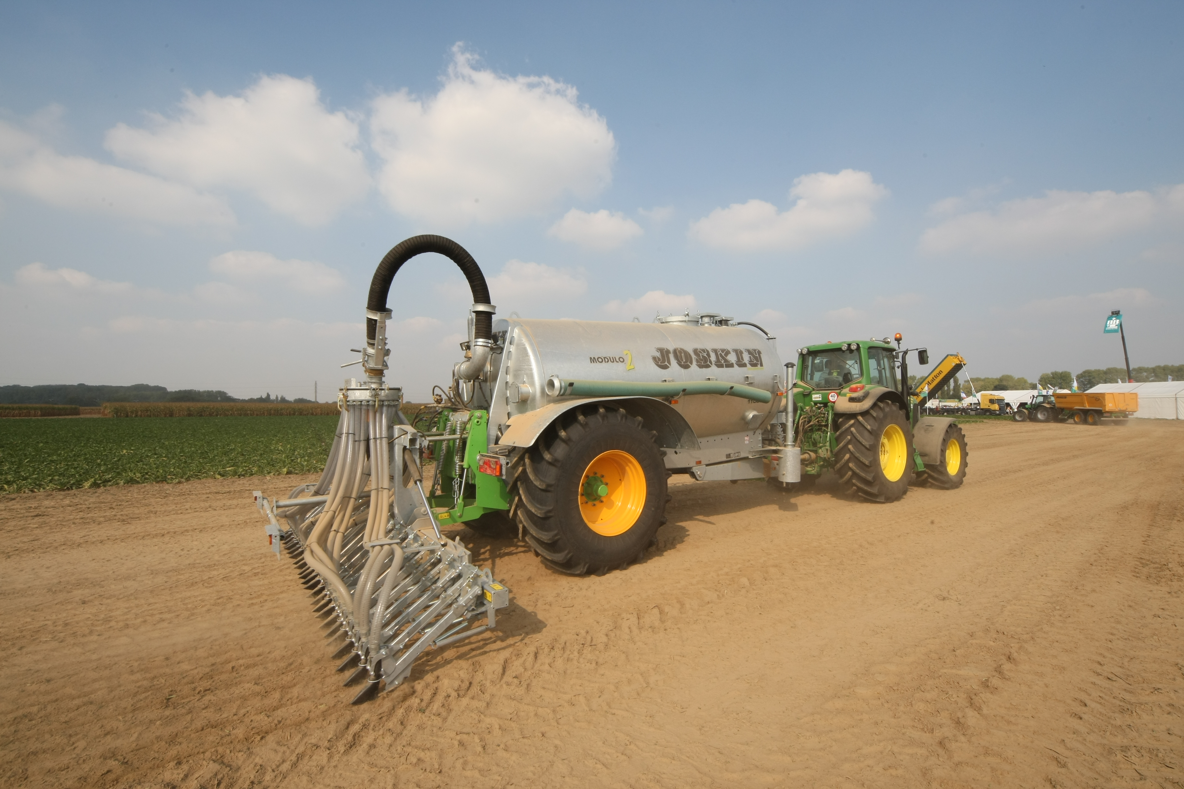 Gülletankwagen Joskin Modulo 2, Werktuigendagen 2009